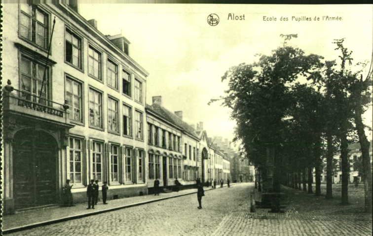 Een laan met aan de ene kant twee rijen bomen en aan de andere kant een aaneengesloten rij gebouwen waaronder de pupillenschool